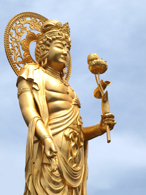 洗心園併設の観音像